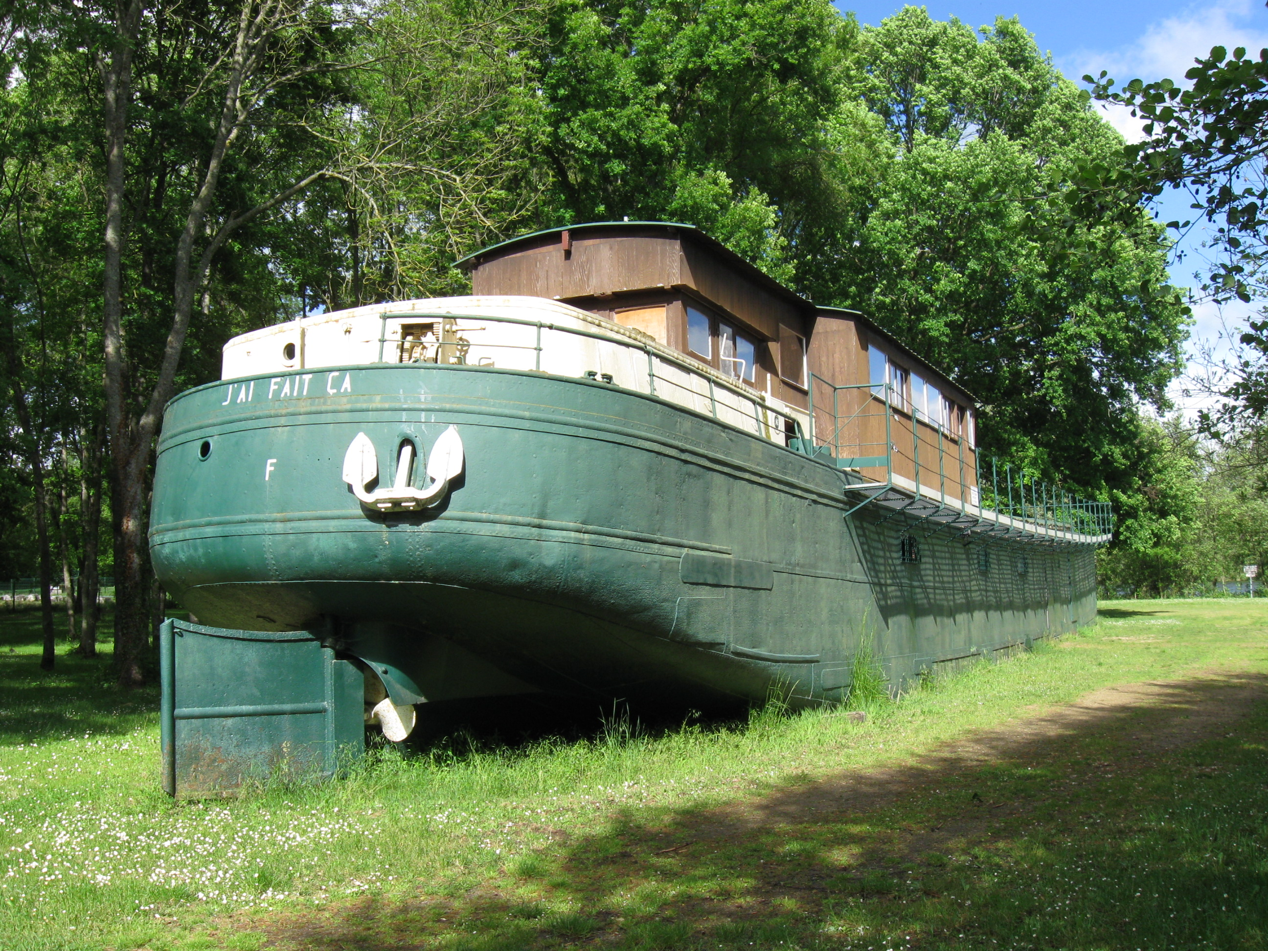 Péniche de 1934 pouvant servir de club-house, « Prairie des Etangs » à Dordives. (Loiret, région Centre-Val de Loire).